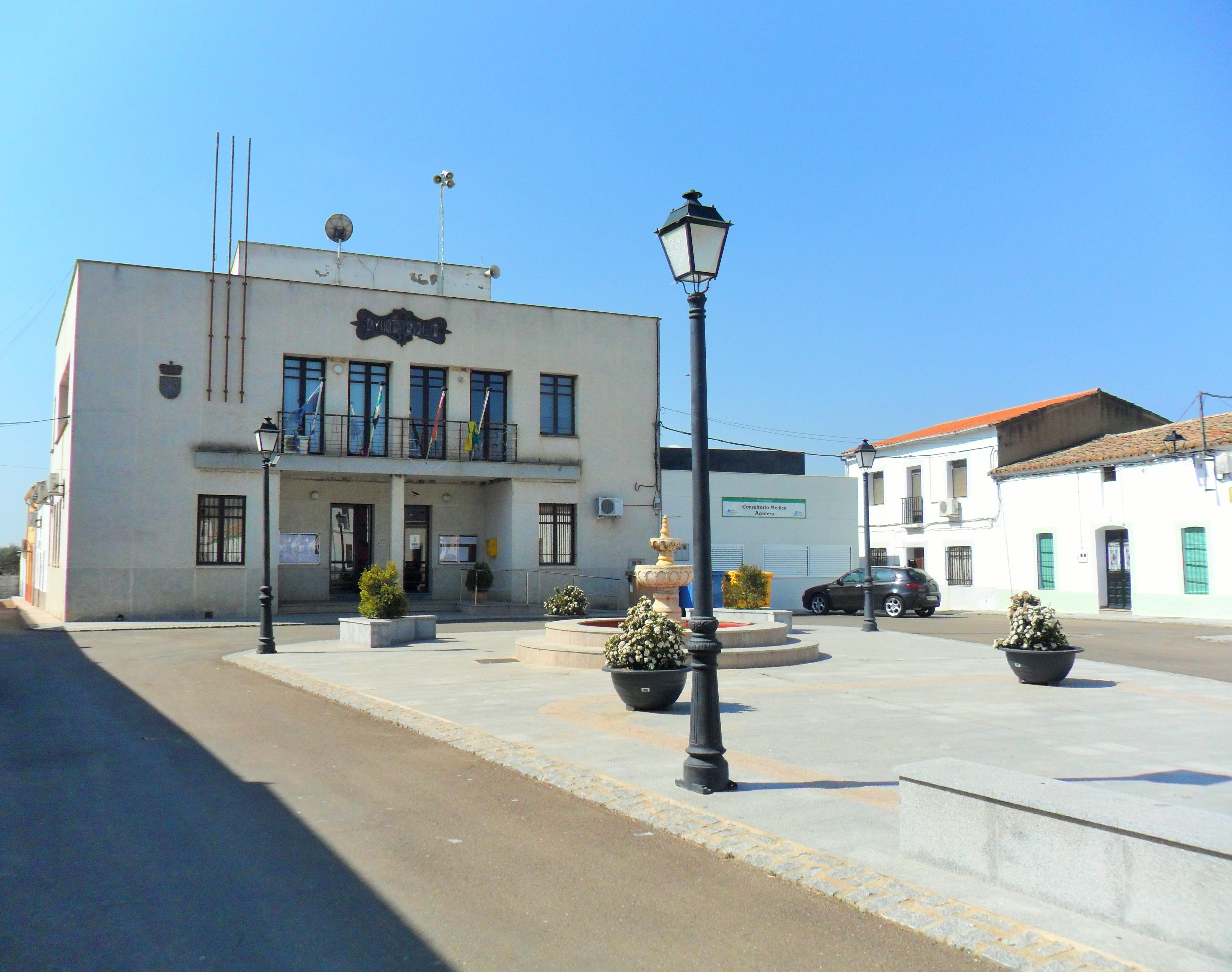 Ayuntamiento de Acedera (provincia de Badajoz, Extremadura).